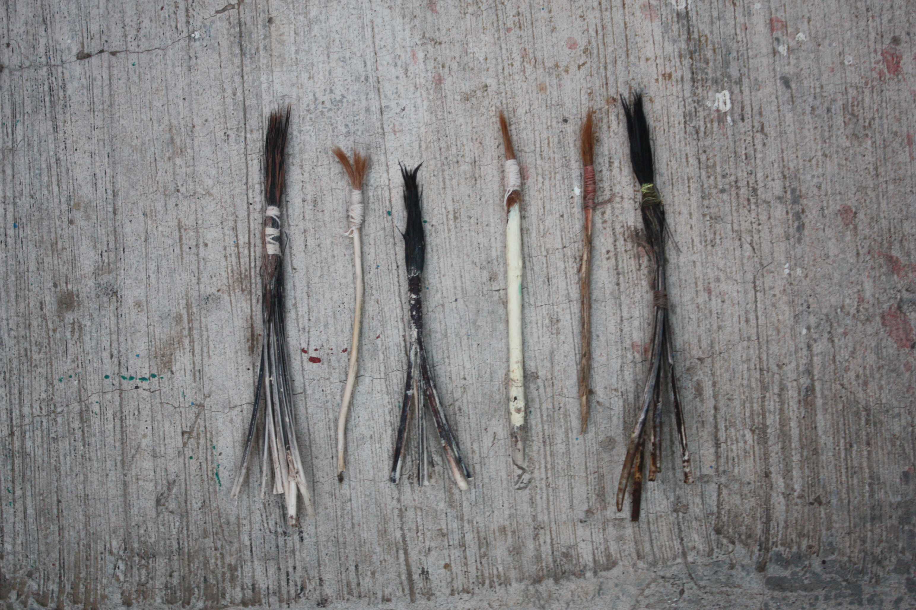 Pinceles rústicos creados para la decoración de piezas de barro en Chililico, Hidalgo